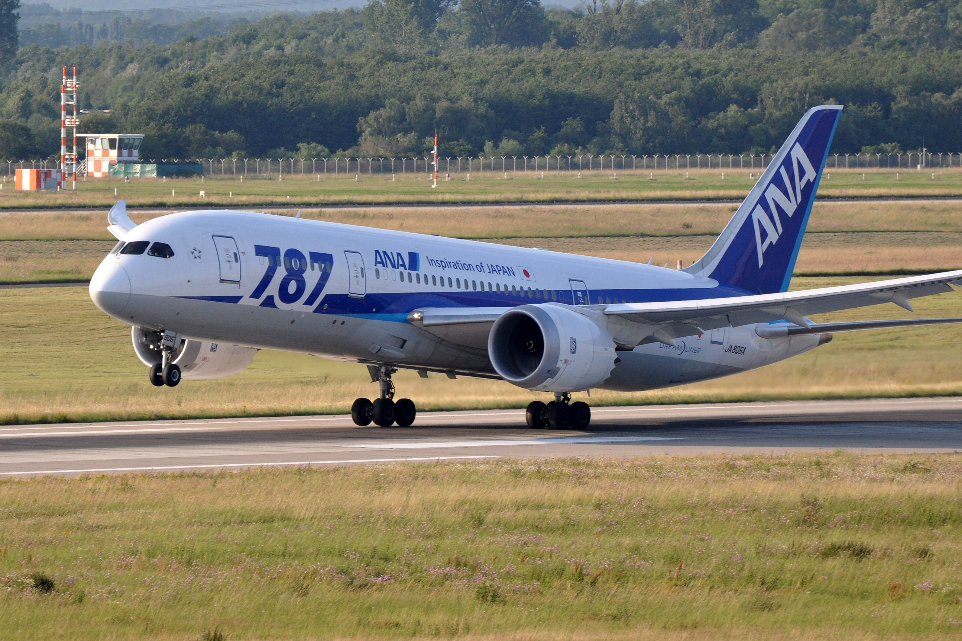 MSN 34515 LN 40 B787-841 ANA ALL NIPPON AIRWAYS DUS